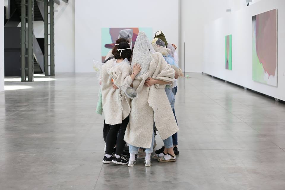 Výstava Jana Merty Návrat, performeři